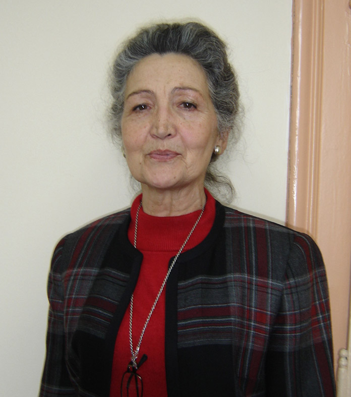 en: Marina Bojić, serbian translator sh: sh: Marina Bojić, srpska prevoditeljica